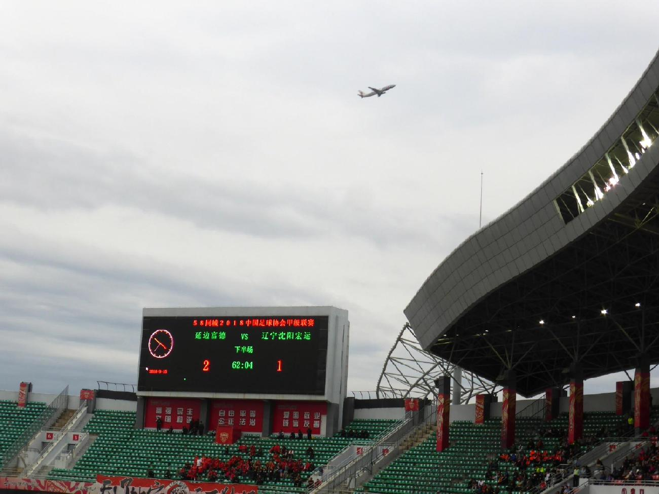 体育場